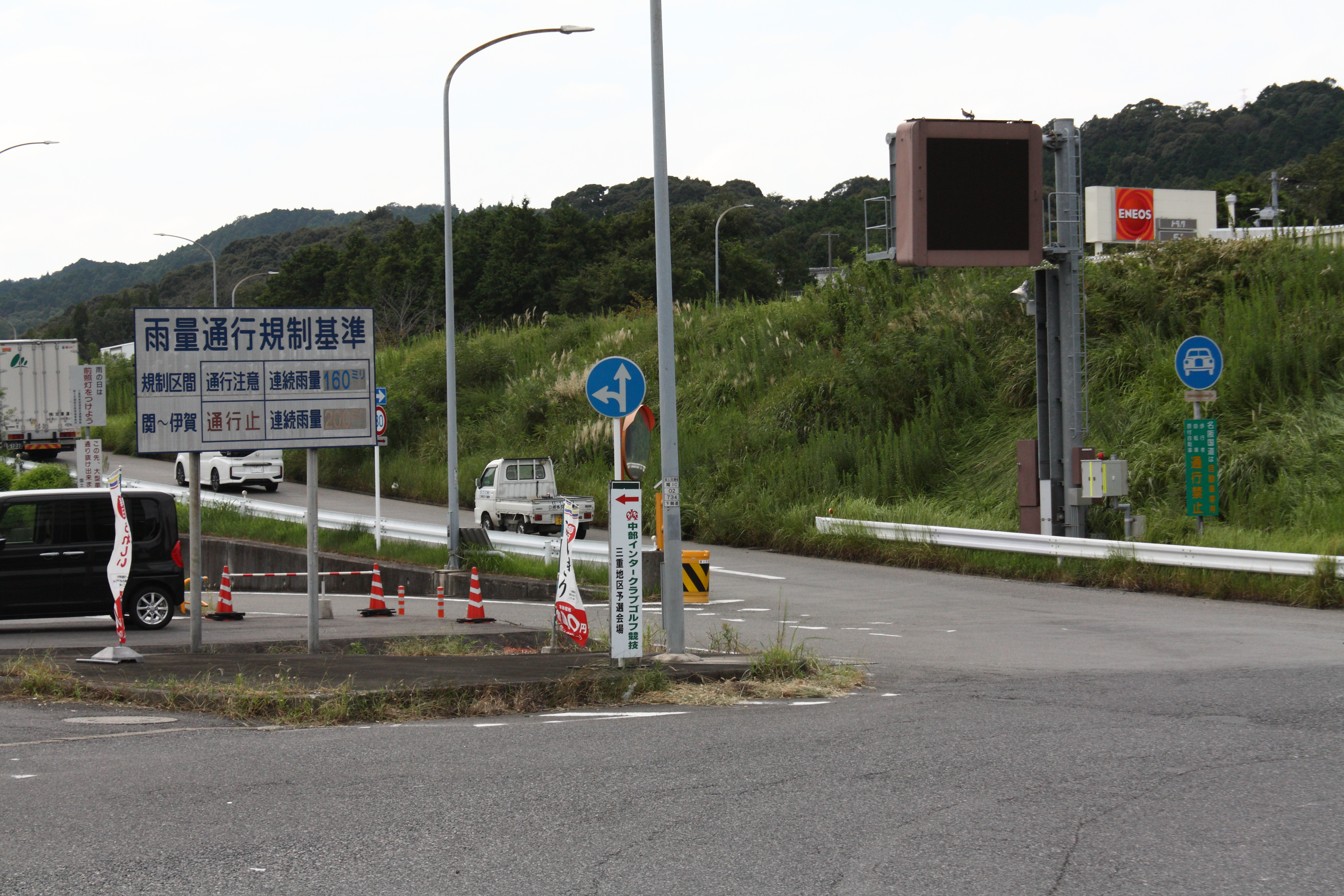 名阪国道 関インターチェンジ 天理方面入口 三重県亀山市関町萩原